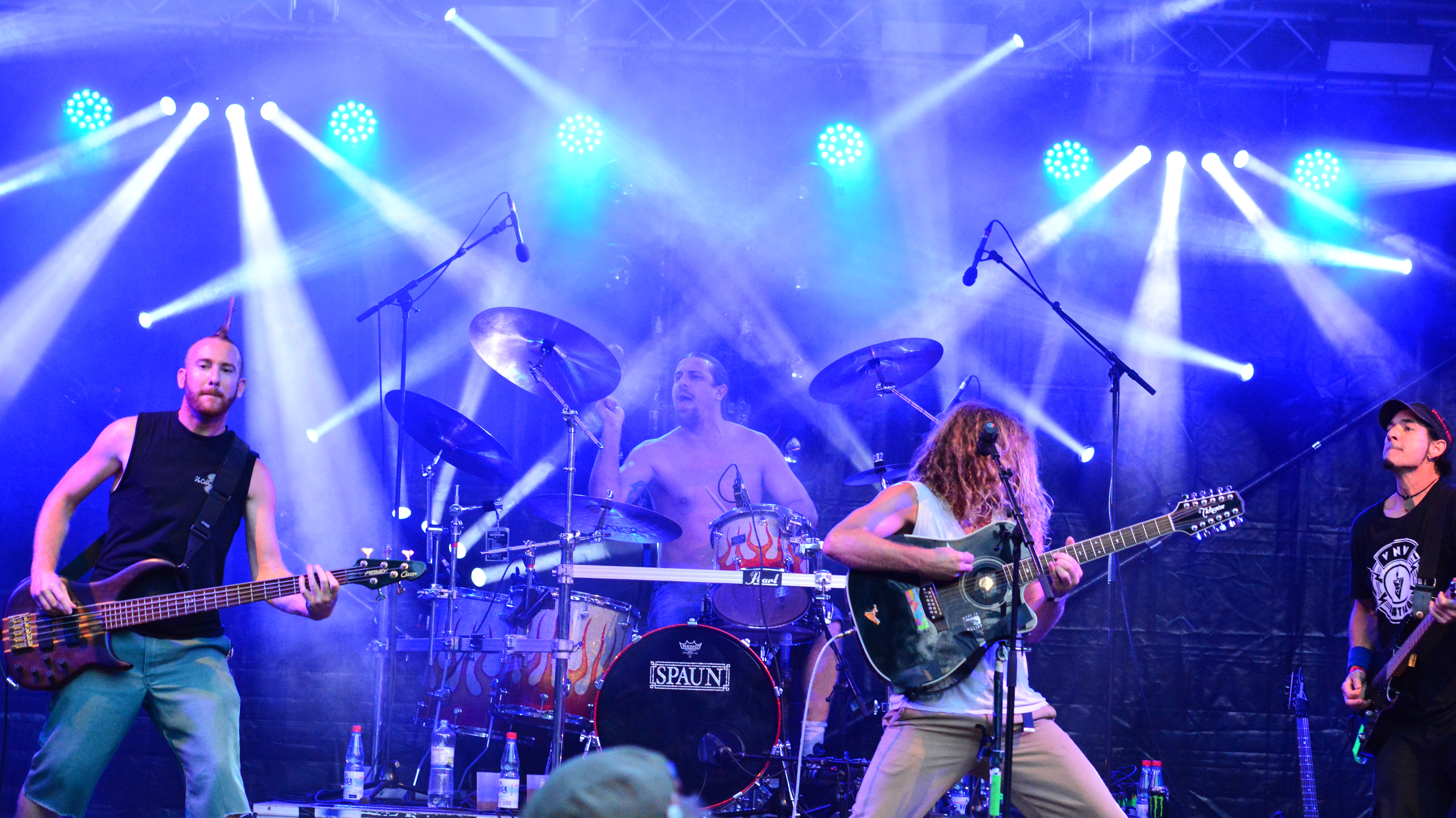 Die kalifornische Band Boy Hits Car beim Langeln Open Air 2014